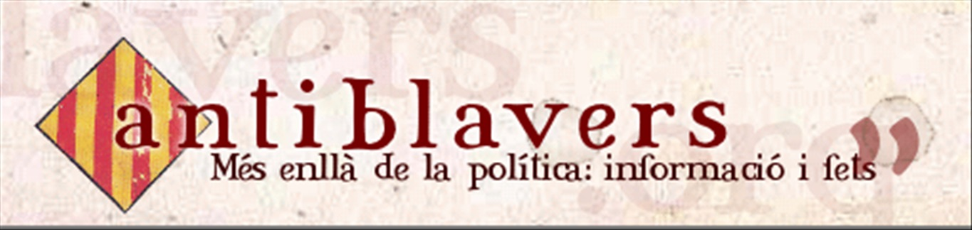 Logo de